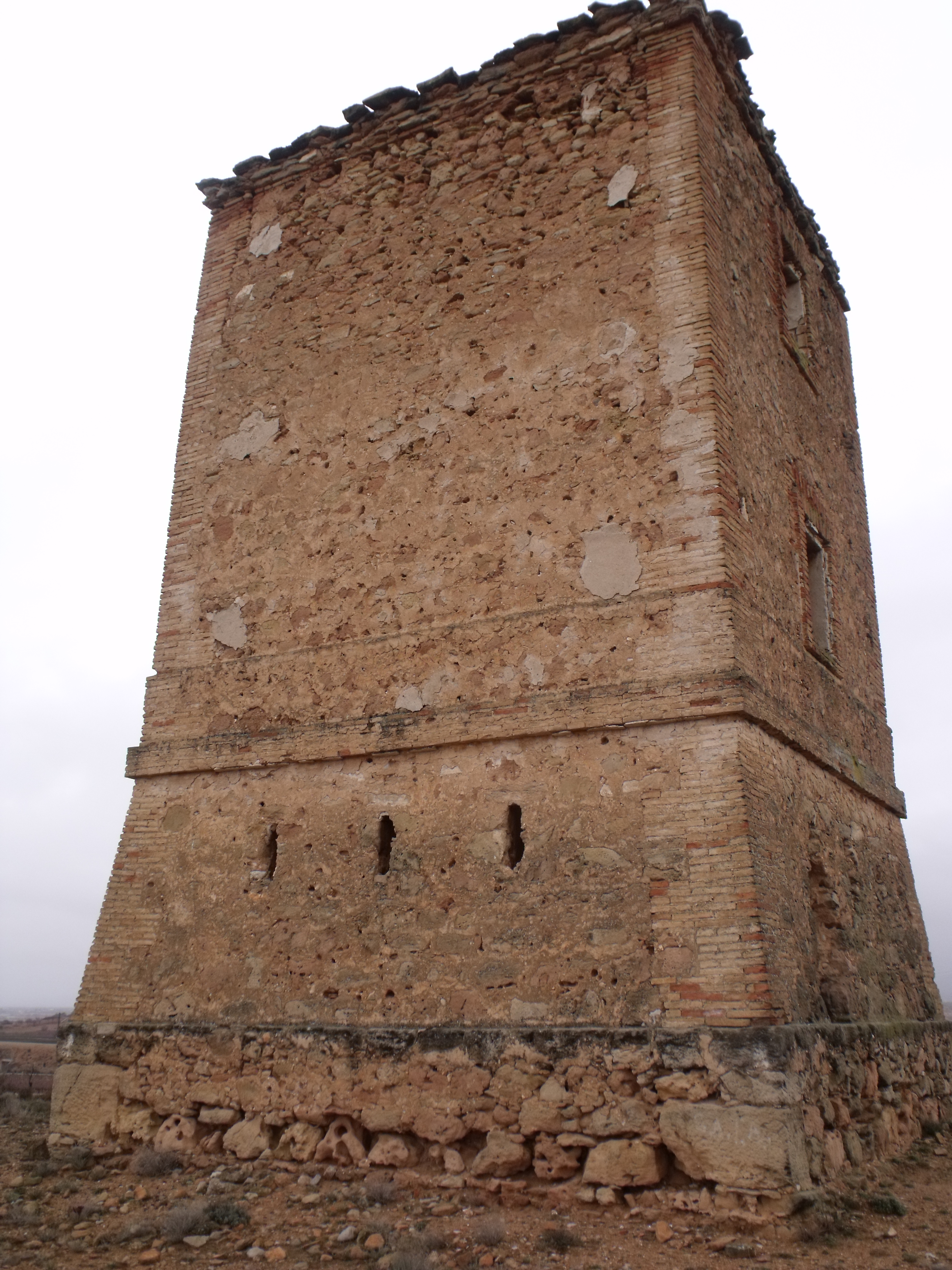 Vistas diversas de la torre de la Jedrea, en San Antonio de Requena